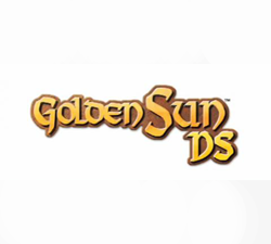 Logotipo de GS DS